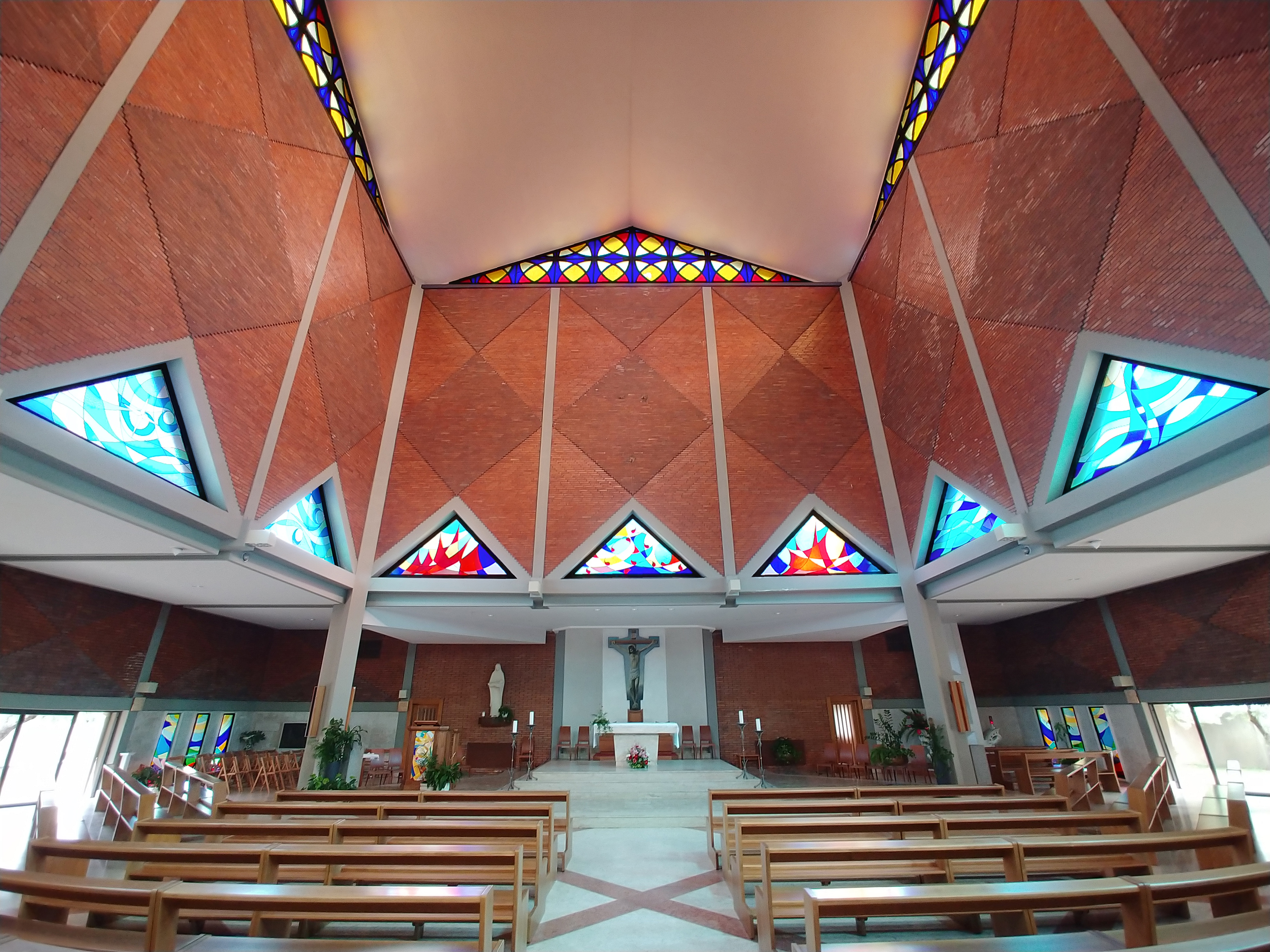 Interno.